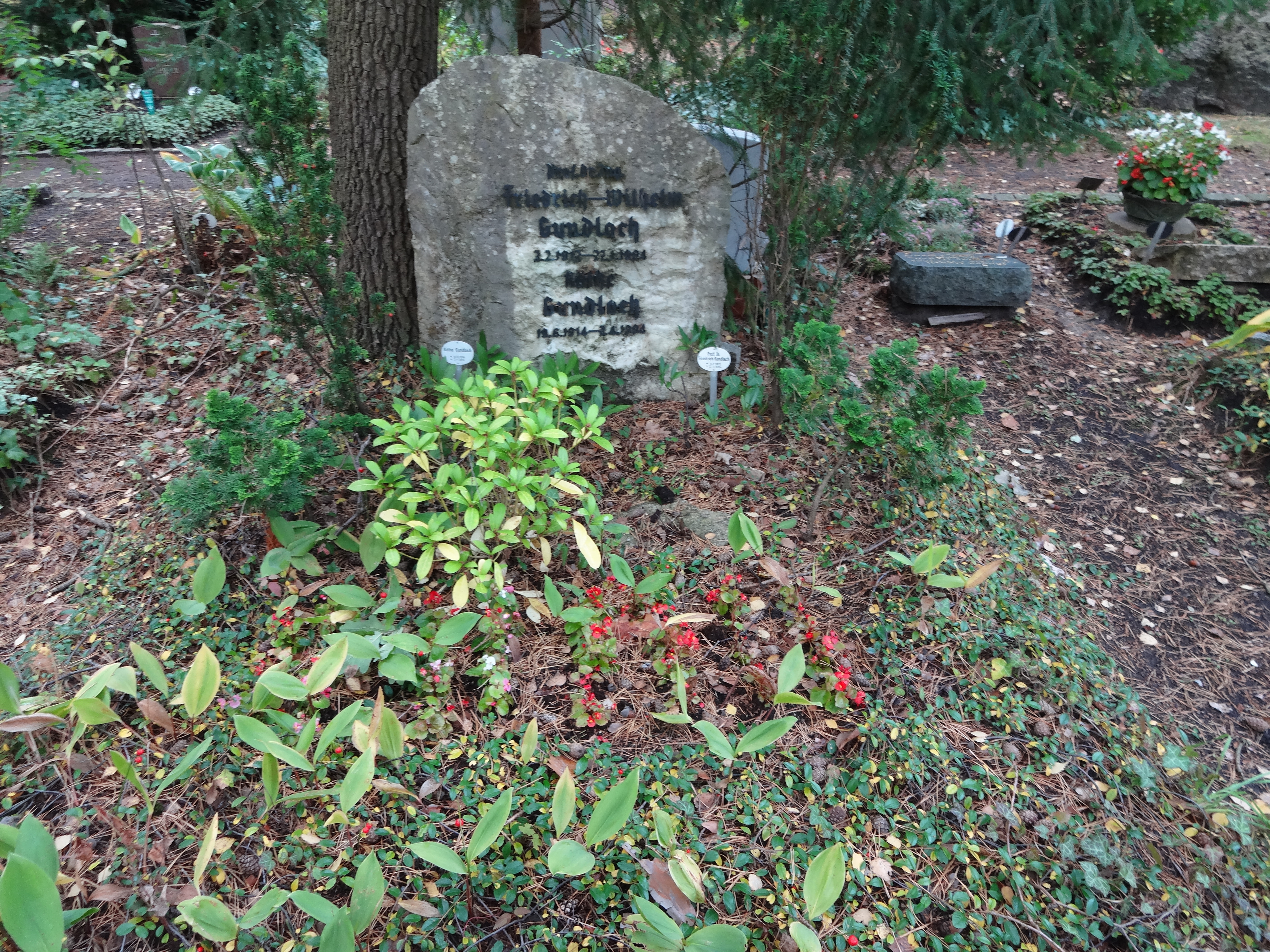 Grab von Prof. Friedrich-Wilhelm Gundlach auf dem Waldfriedhof Zehlendorf